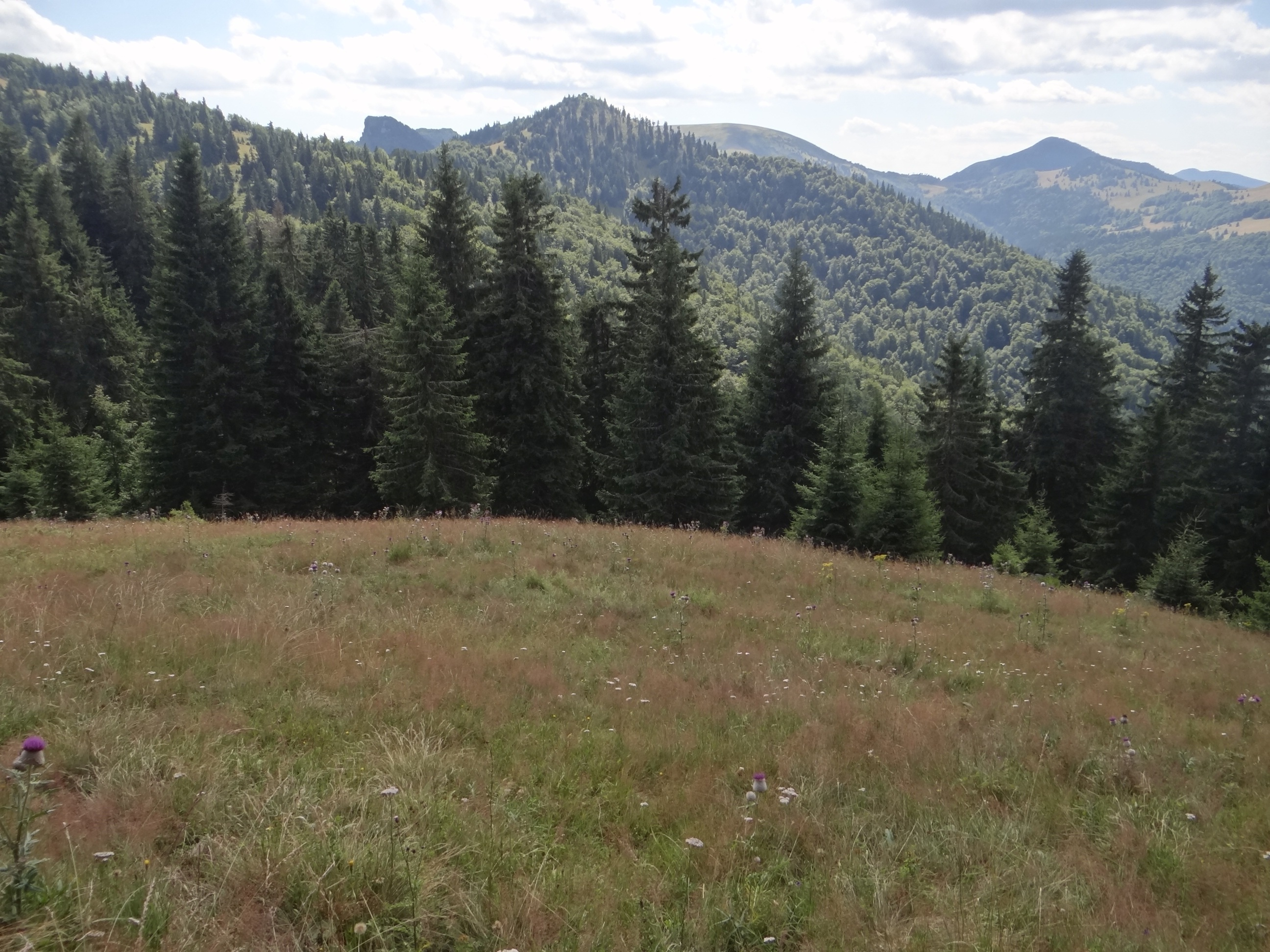 Minčol (Veľká Fatra)